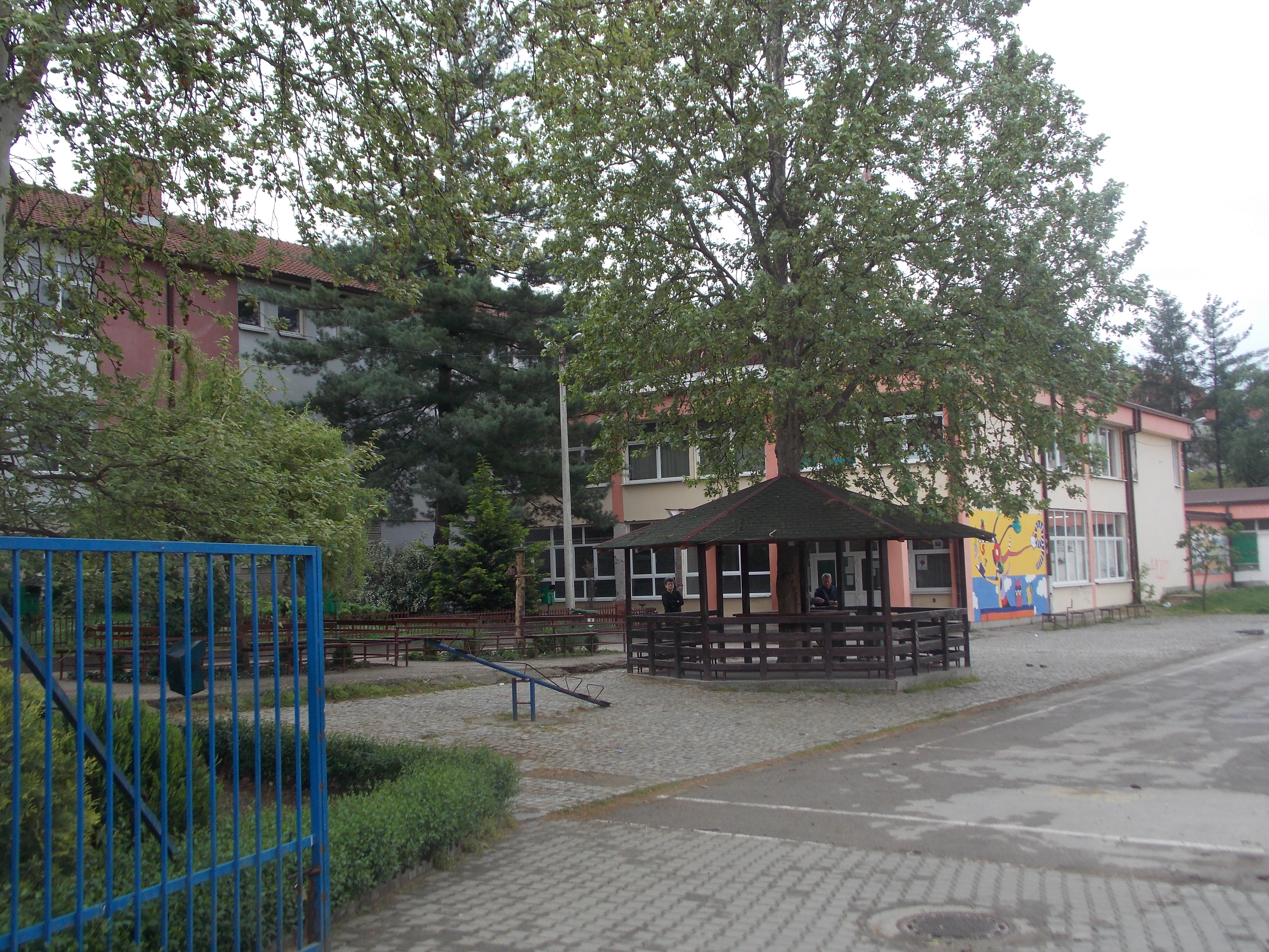 Osnovna škola Kosta Stamenković u Leskovcu